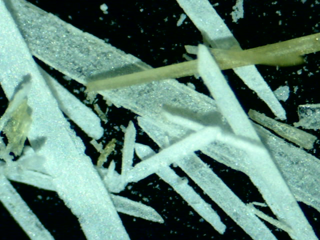 Jehlice azidu olovnatého (modifikace beta) pod mikroskopem